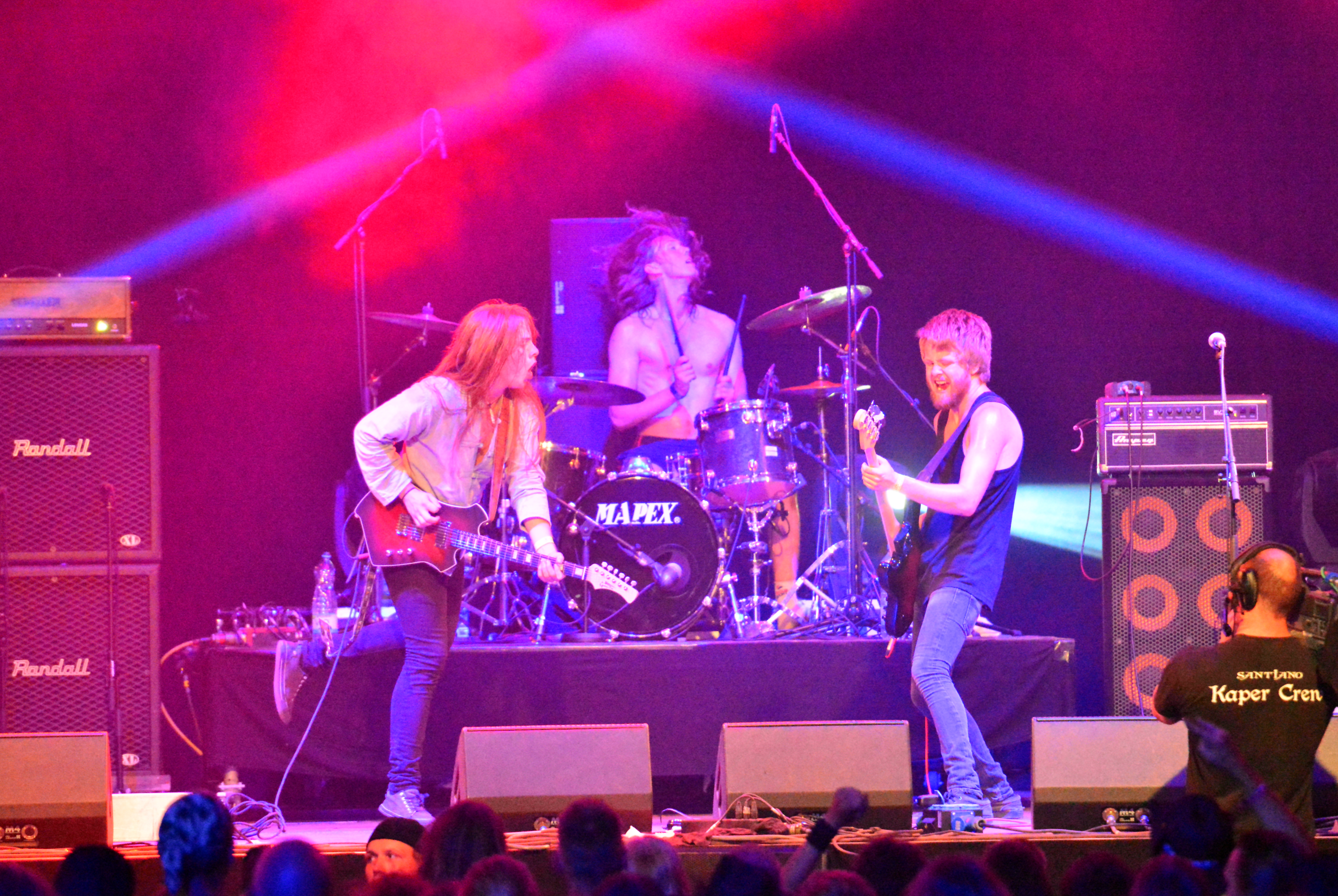 The Vintage Caravan beim Wacken Open Air 2014